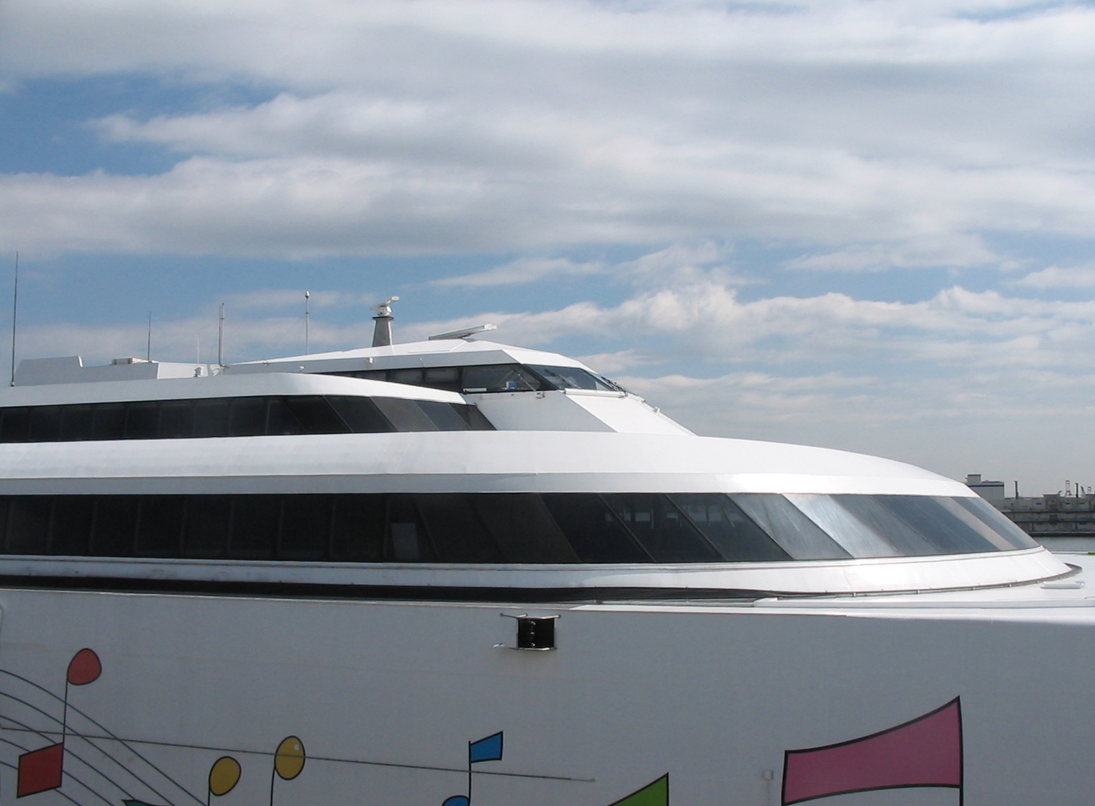 Bridge and Passenger's cabin on High speed car ferry "Natchan World". at OSANBASHI YOKOHAMA INTERNATIONAL PASSENGER TERMINAL. Yokohama City,Kanagawa Pref,Japan. March,7,2009